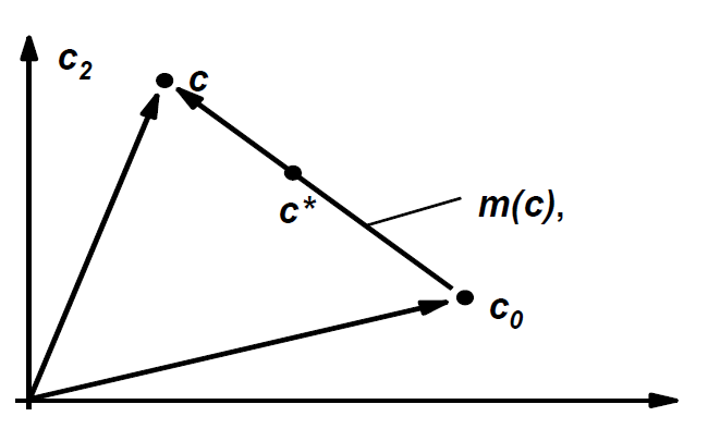 Mischen